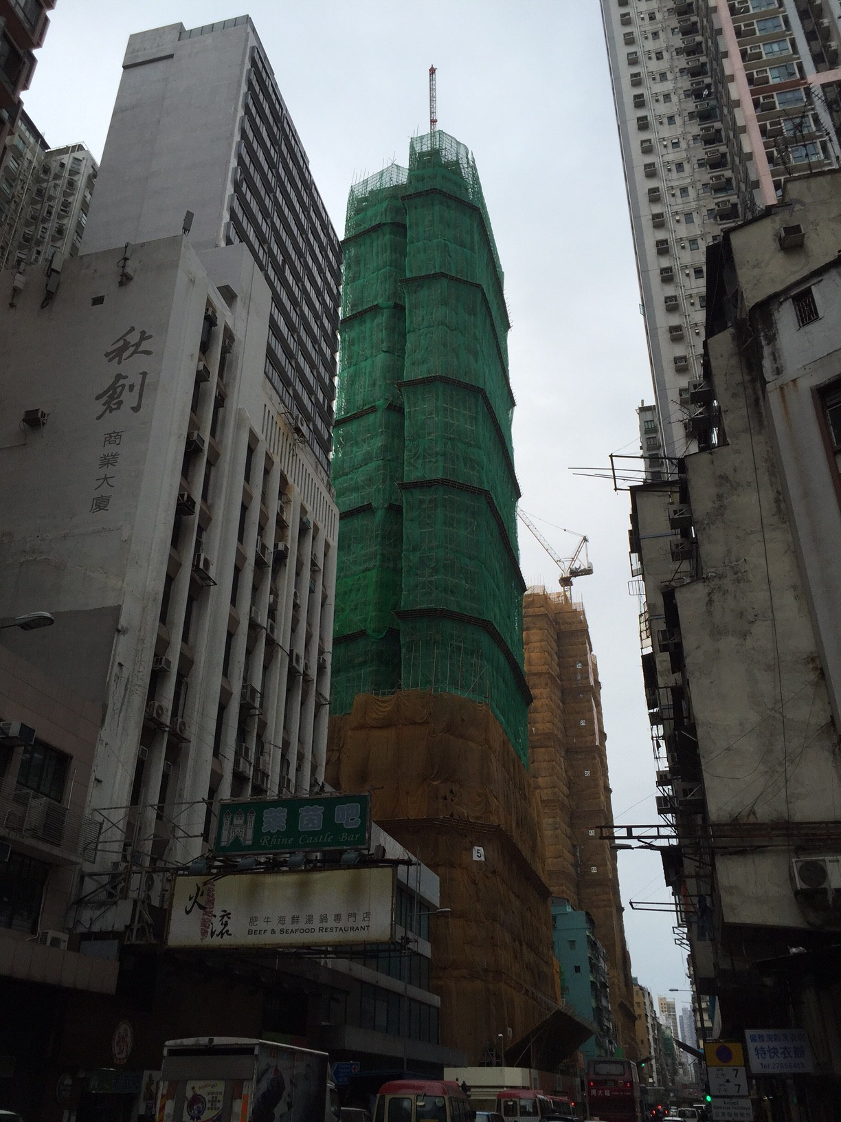 中文（香港）: 喜盈(建築中, 2014年12月1日)